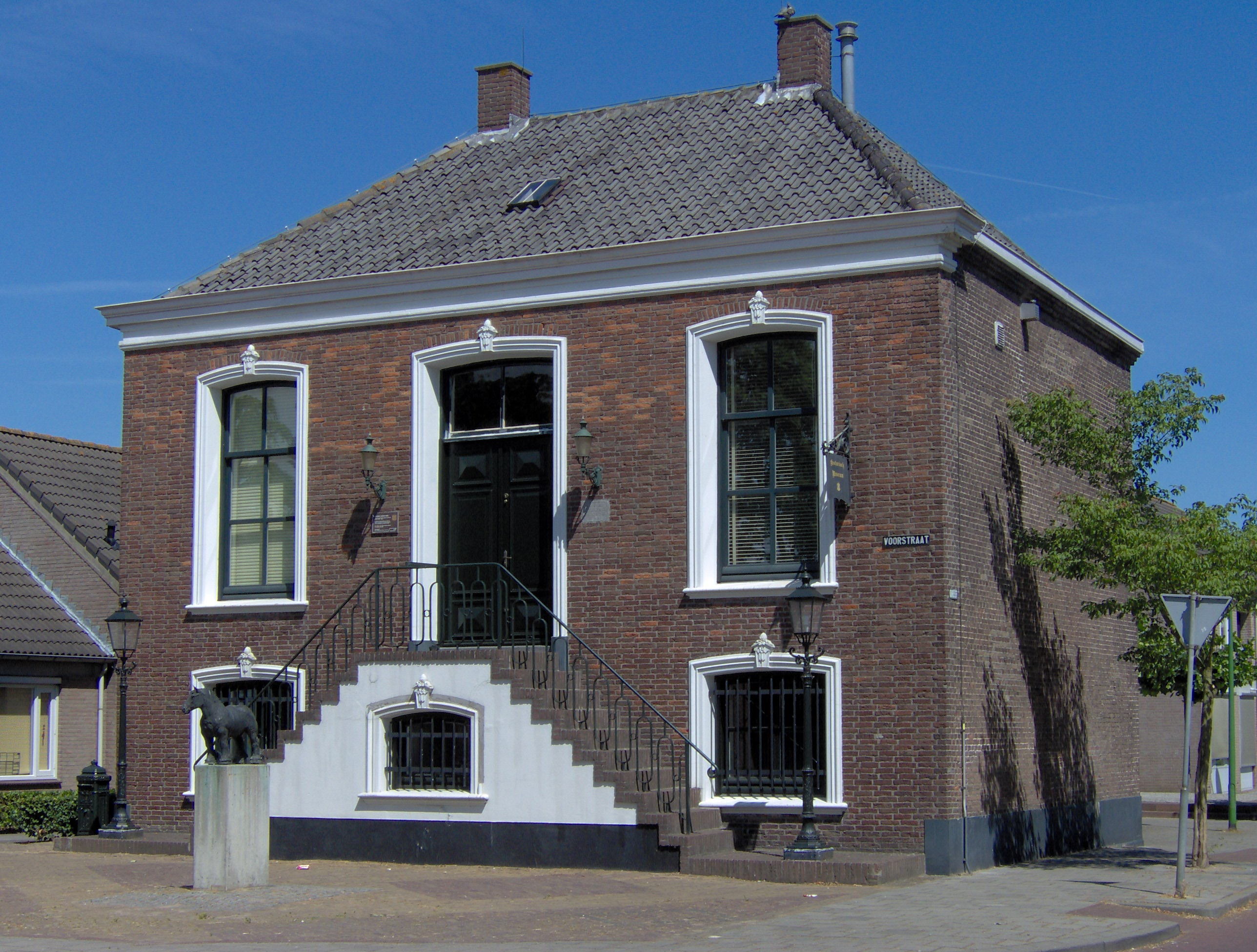 eigen foto